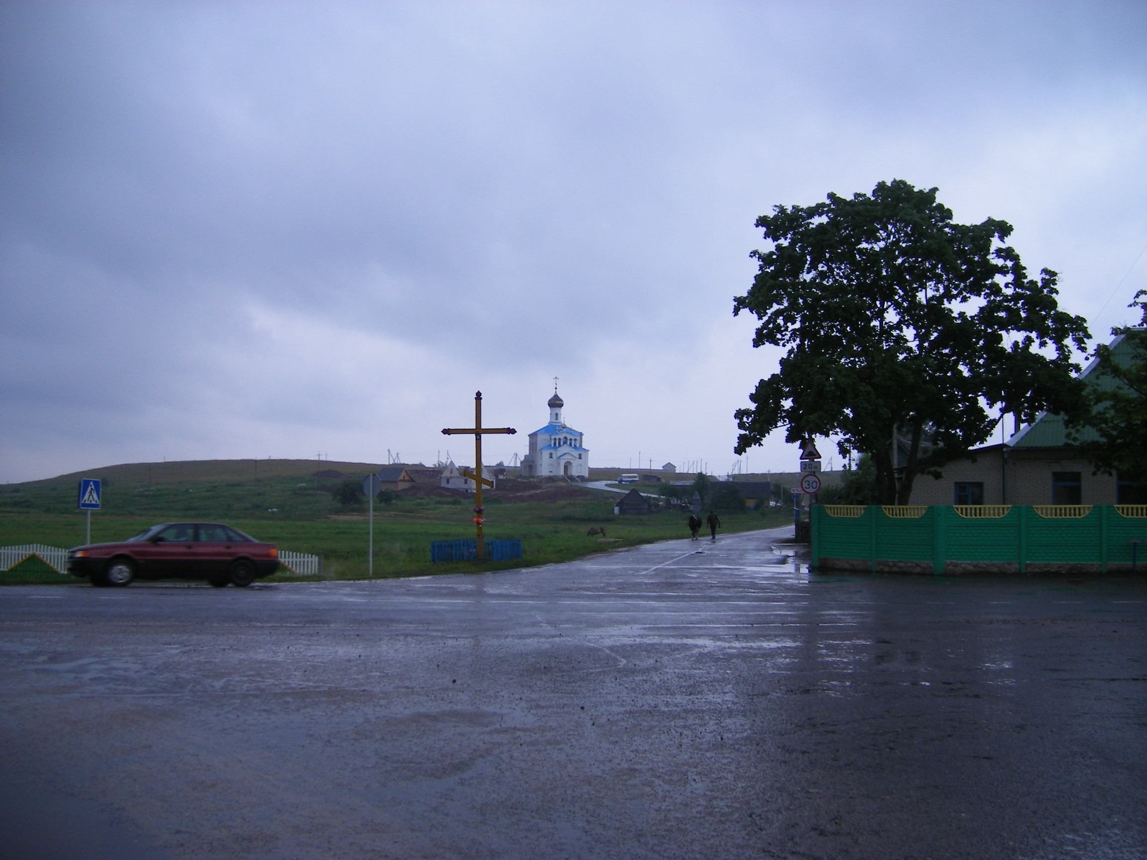 Myadzel, Troitskaya Church